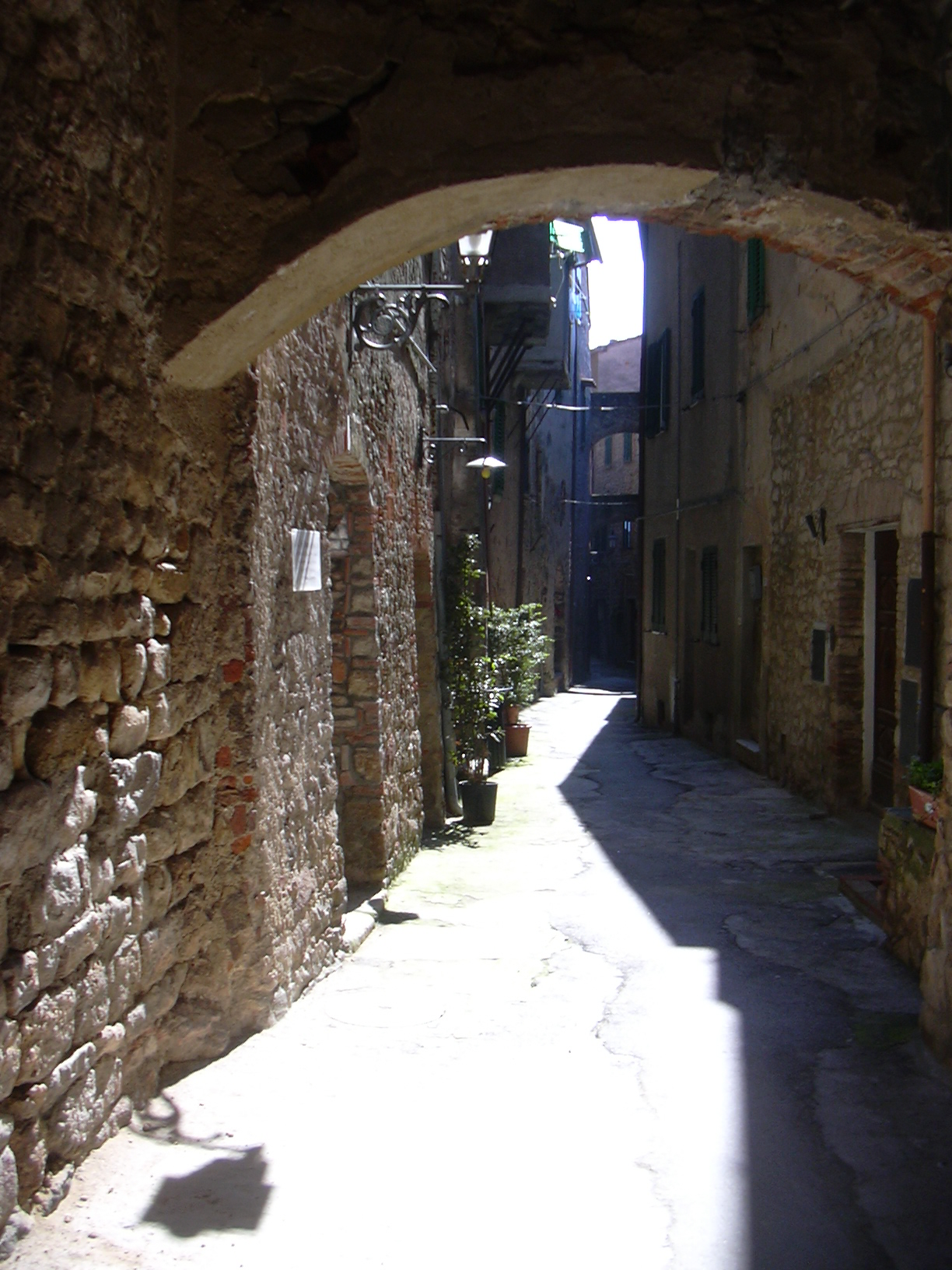 Gavorrano/Tuscany, Via Pannocchieschi